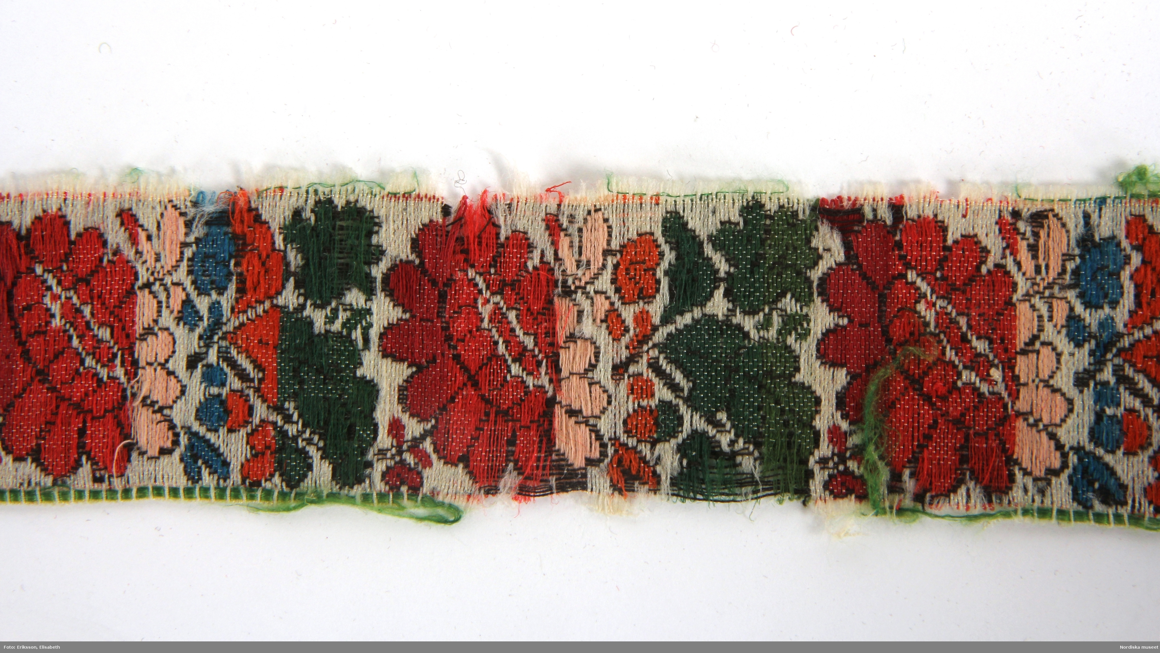 Huvudliggaren (år 1883): "35.726 Brudgumsdräkt fr. Toarps sn. Ås hd. Västergötland. a. Blå långrock, med broderi i silke. b. Röd toppmössa; till mössan hör en tofs i toppen. c. Väst, troligen begagnad som tröja. d. Blå knäbyxor. e. Strumpeband. Till banden höra runda tofsar. 'Dräkten är från början af detta århundrade.'; Se bref från Södermark 21/5 1883. a. Maläten. d. Maläten. e. Maläten. 'I dräkten saknas: strumpor, hvita eller blå, skor, helst med spännen, bomullshalsduk, skjorta.' Se bref från Södermark af den 22/5 1883. G. af handlanden Oscar Vennberg i Borås genom lant [?]kamrer I.A. Södermark i Borås 23/5 1883. Bil. Södermark."